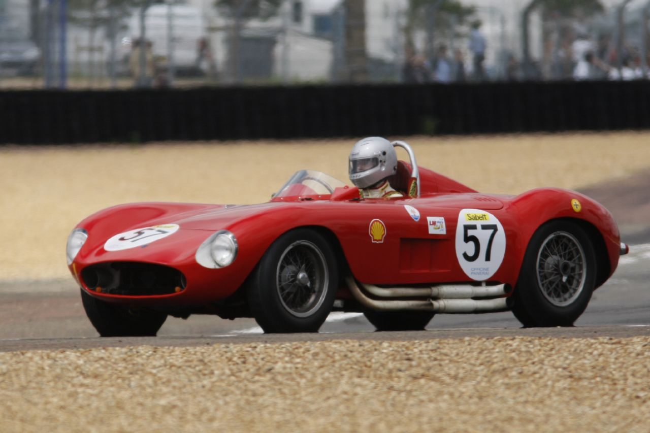 1955 Maserati 300 S s/n 3051 de Daniel MAIER, Bugatti Circuito